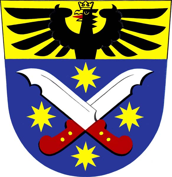 Znak obce Lechotice